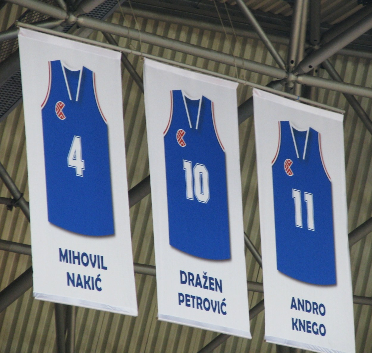 Dresovi Mihovila Nakića, Dražena Petrovića i Andre Knege u Košarkaškom centru Dražena Petrovića u Zagrebu